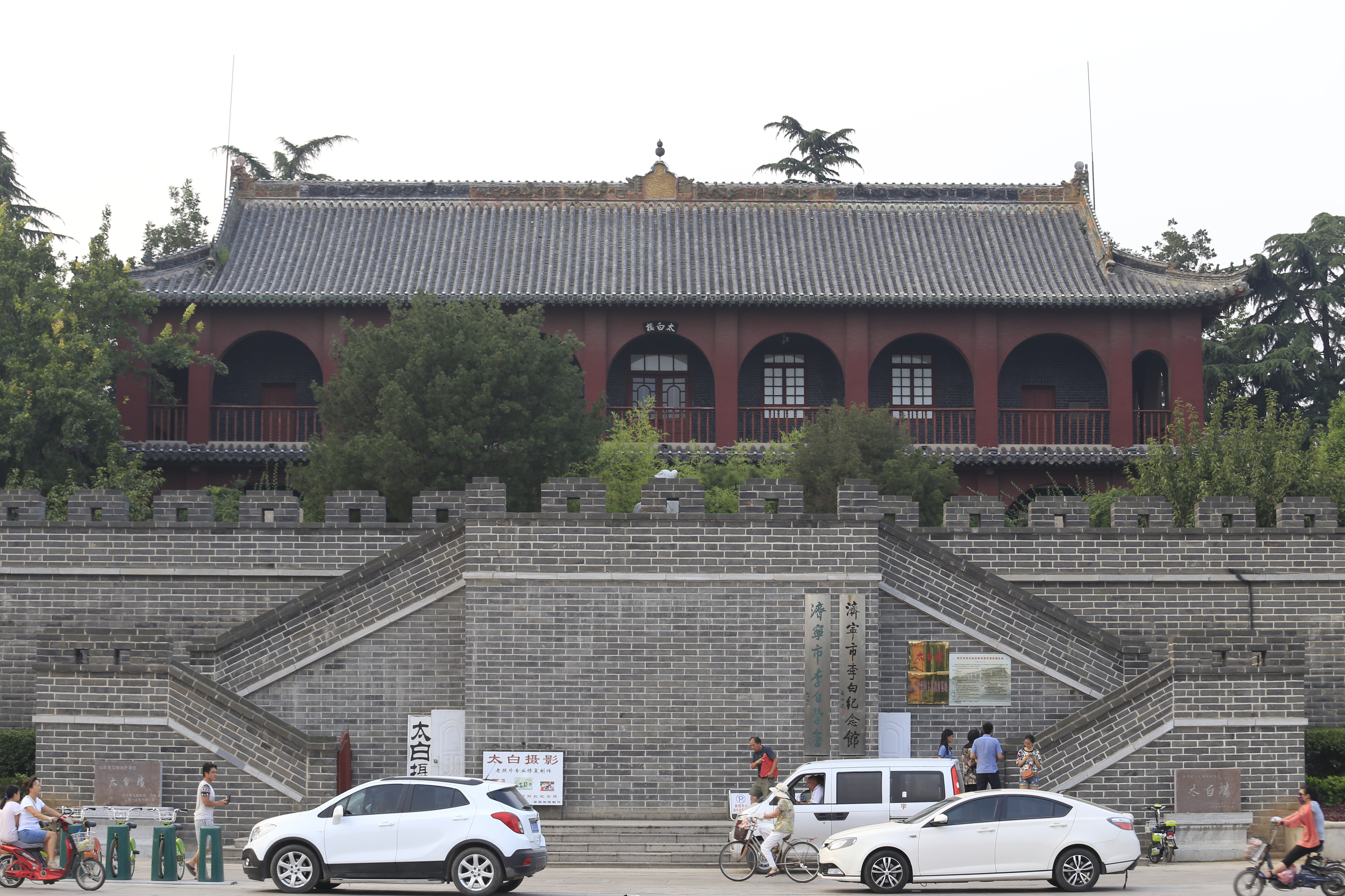 济宁太白楼